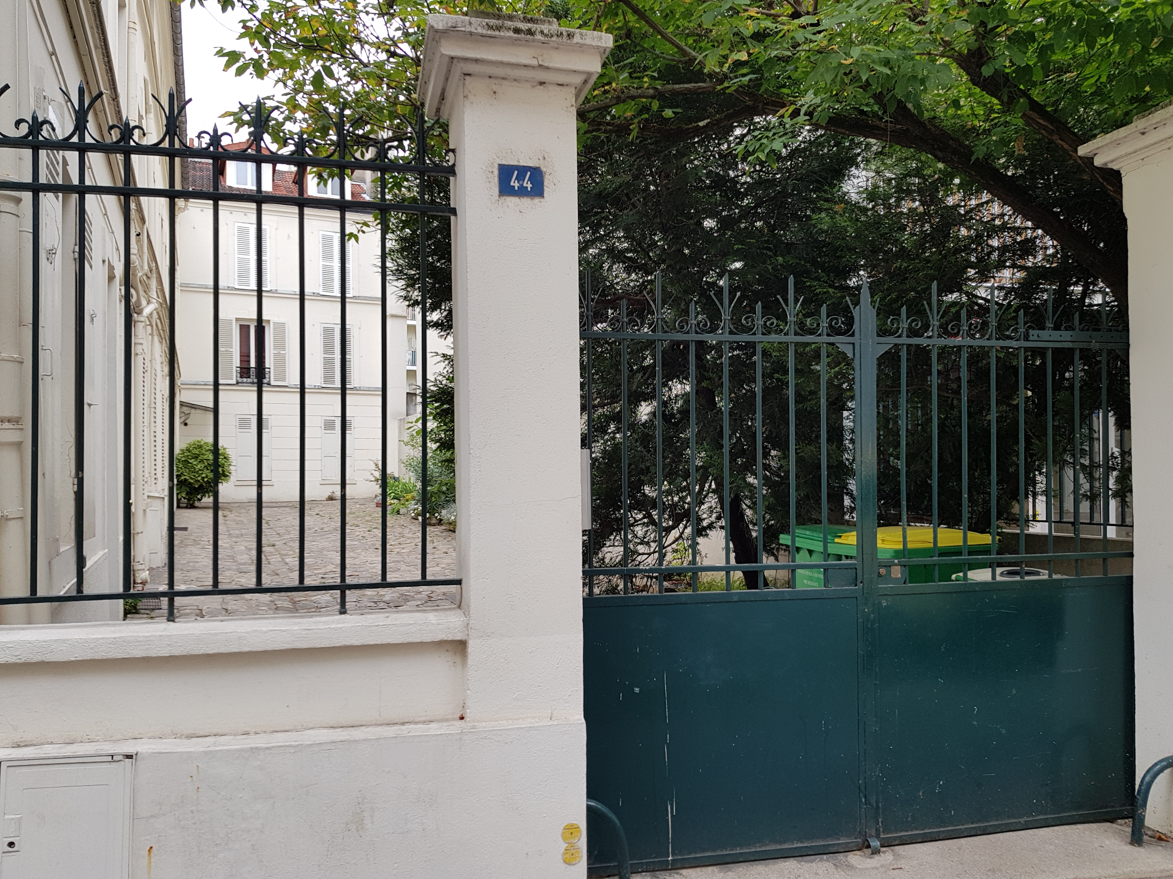 44, rue Claude-Terrasse, Paris 16e.